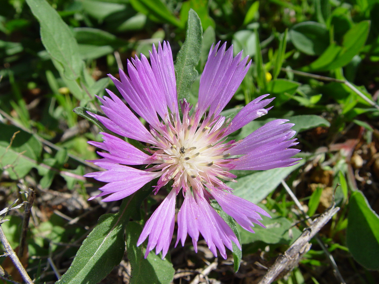 Species Centaurea pullata Familia Asteraceae